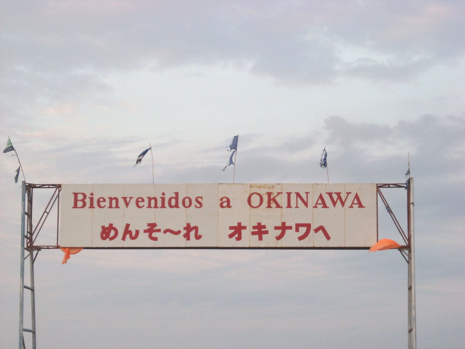 Colonia Okinawa,Santa Cruz de la Sierra, Bolivia